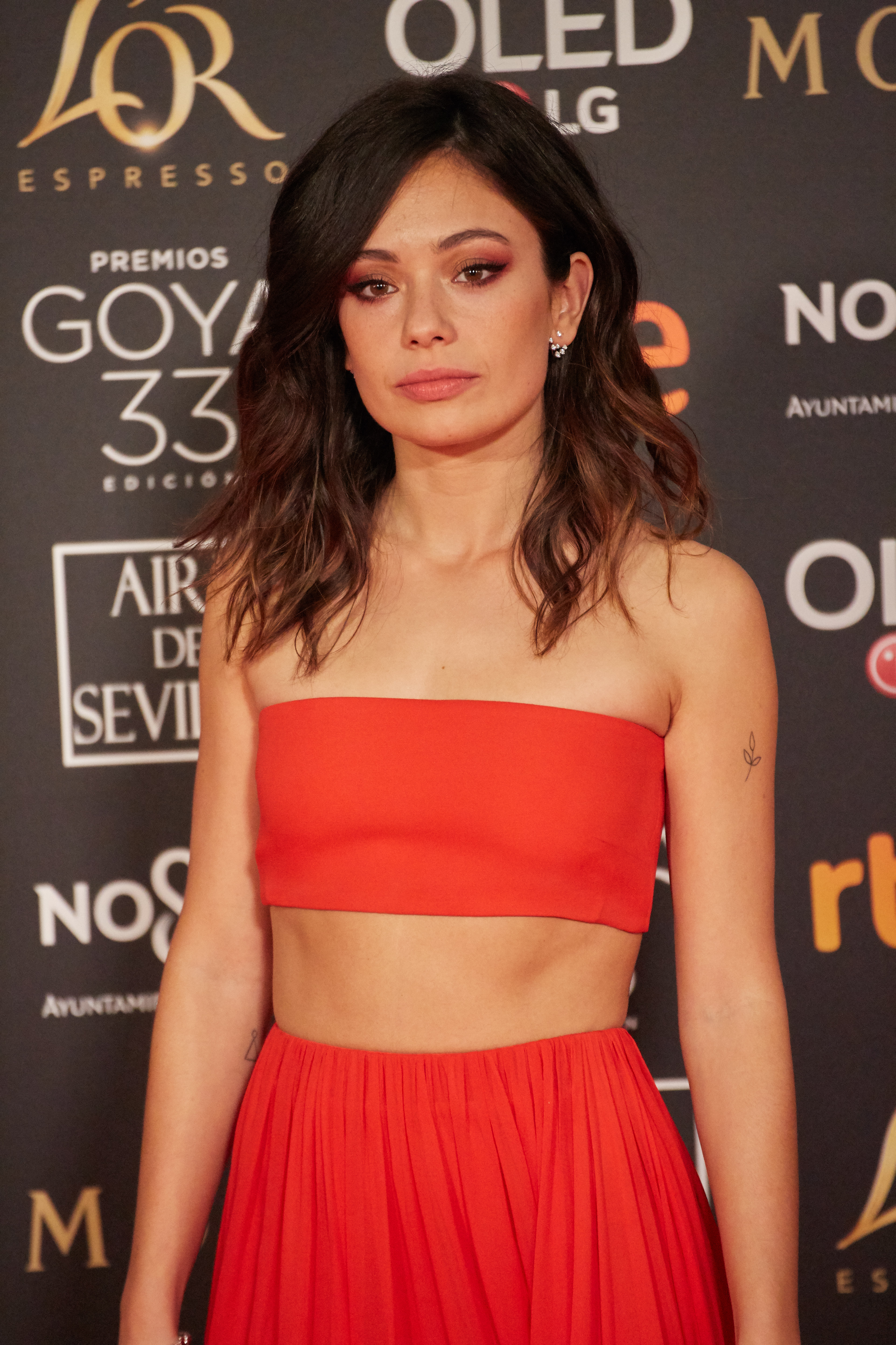 Anna Castillo en la alfombra roja de los Premios Goya celebrados en Sevilla en Febrero 2019